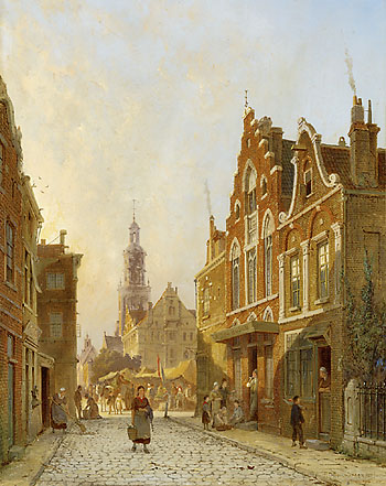 Street in Winschoten, 1889